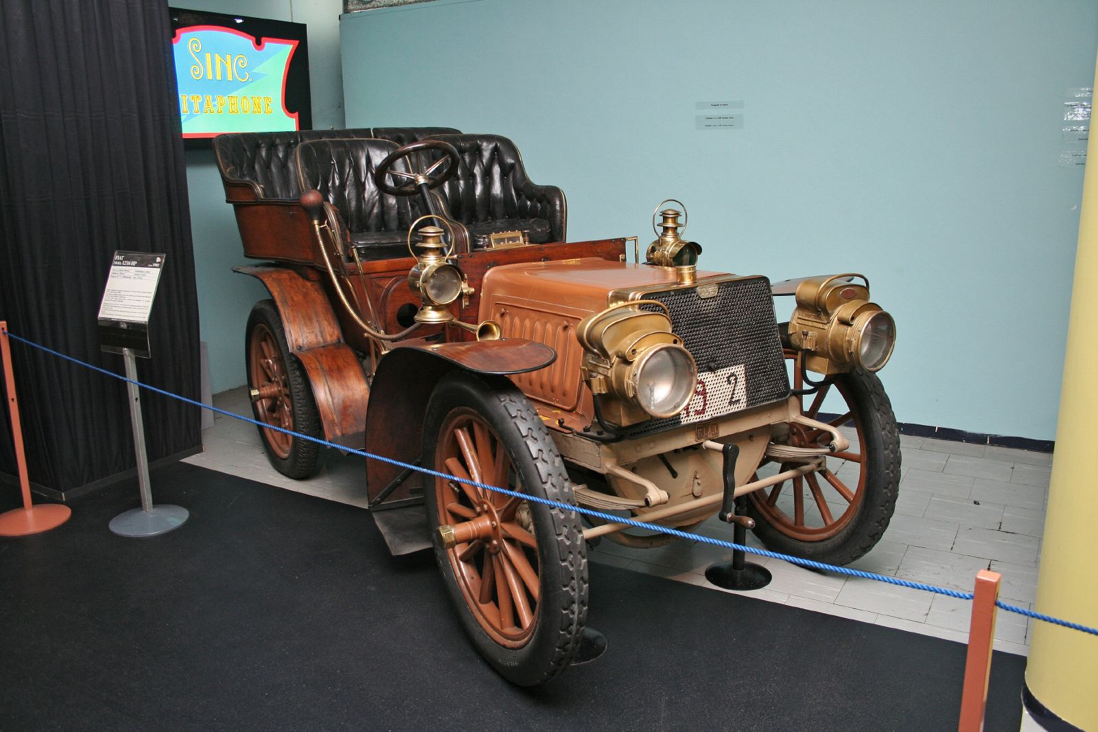 Fiat 12 HP dell Automobile